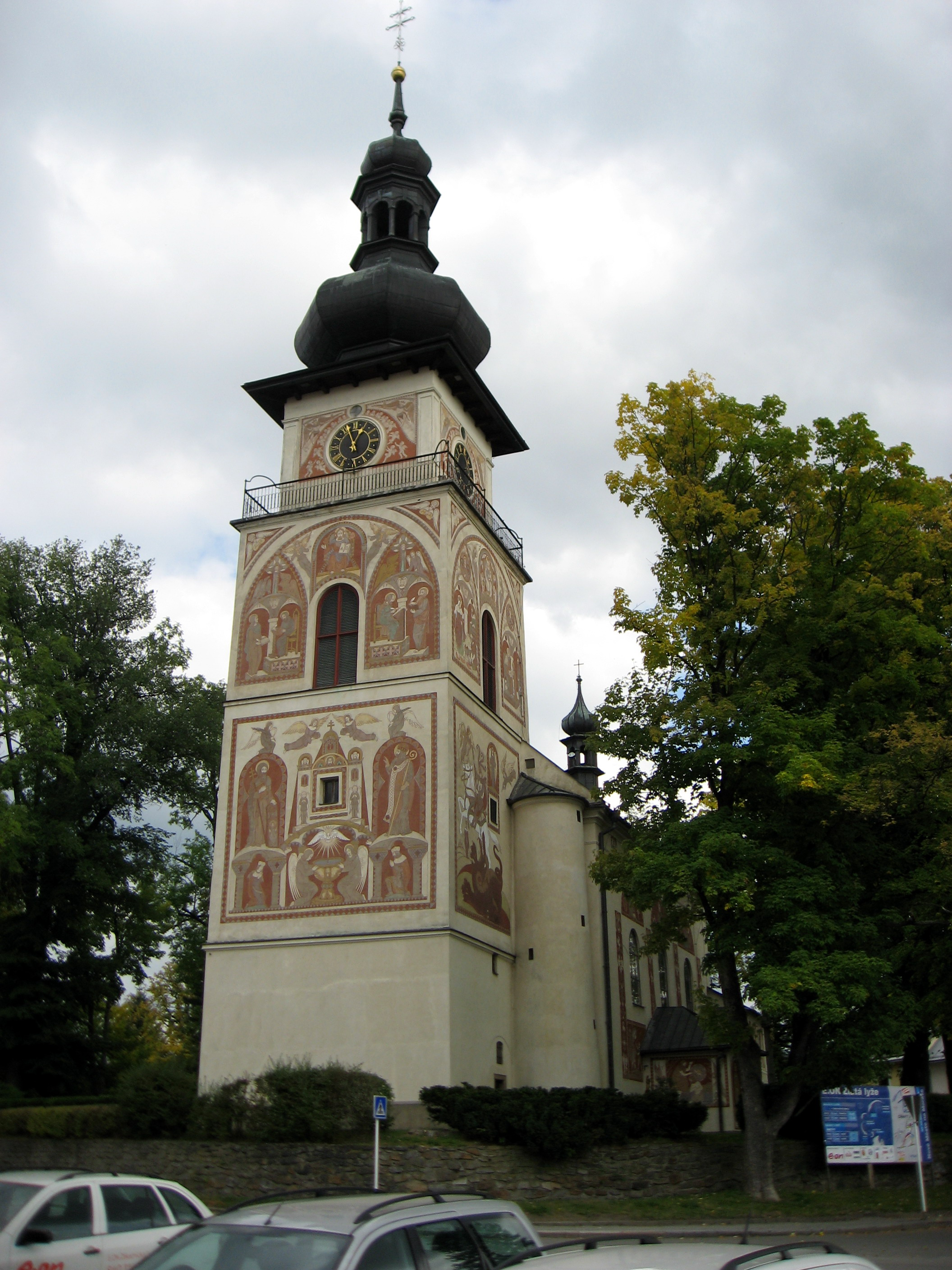 Nové Město na Moravě, katolický kostel